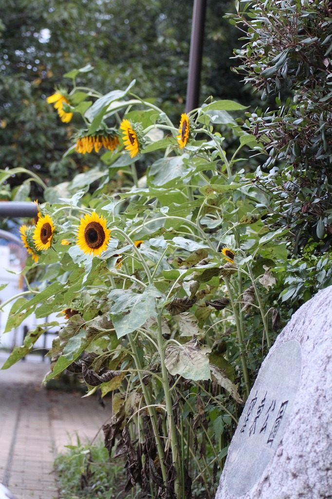 咲き乱れる向日葵と一緒に。